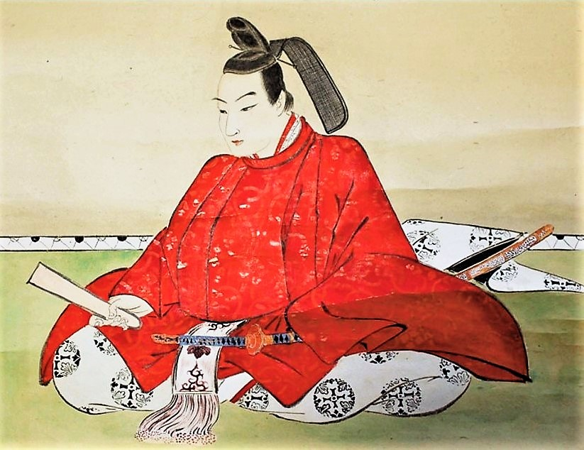 松平乗全の肖像(部分)。